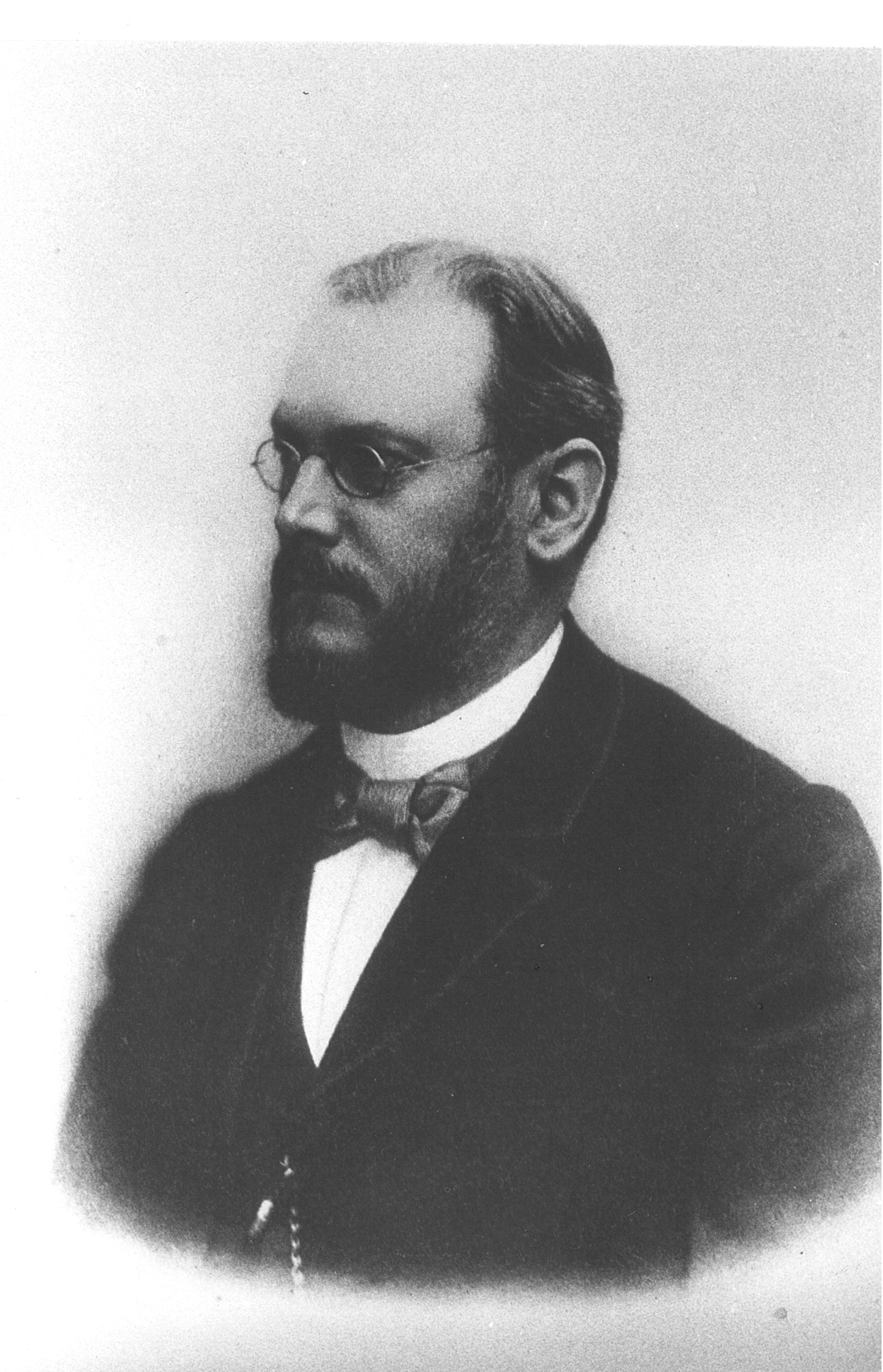 Ernst Becker, Astronom andere Versionen